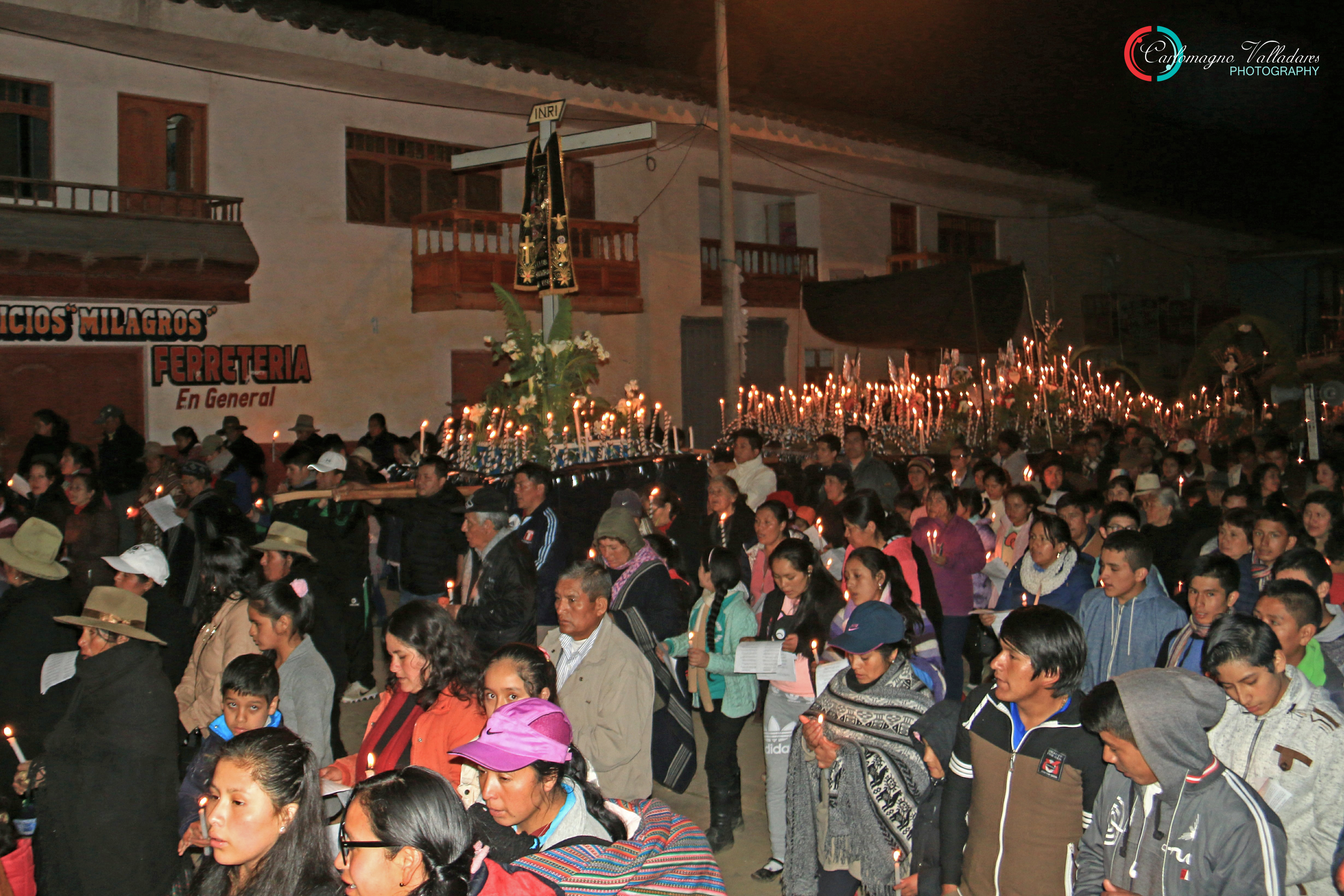 Perímetros de la Plaza de Armas